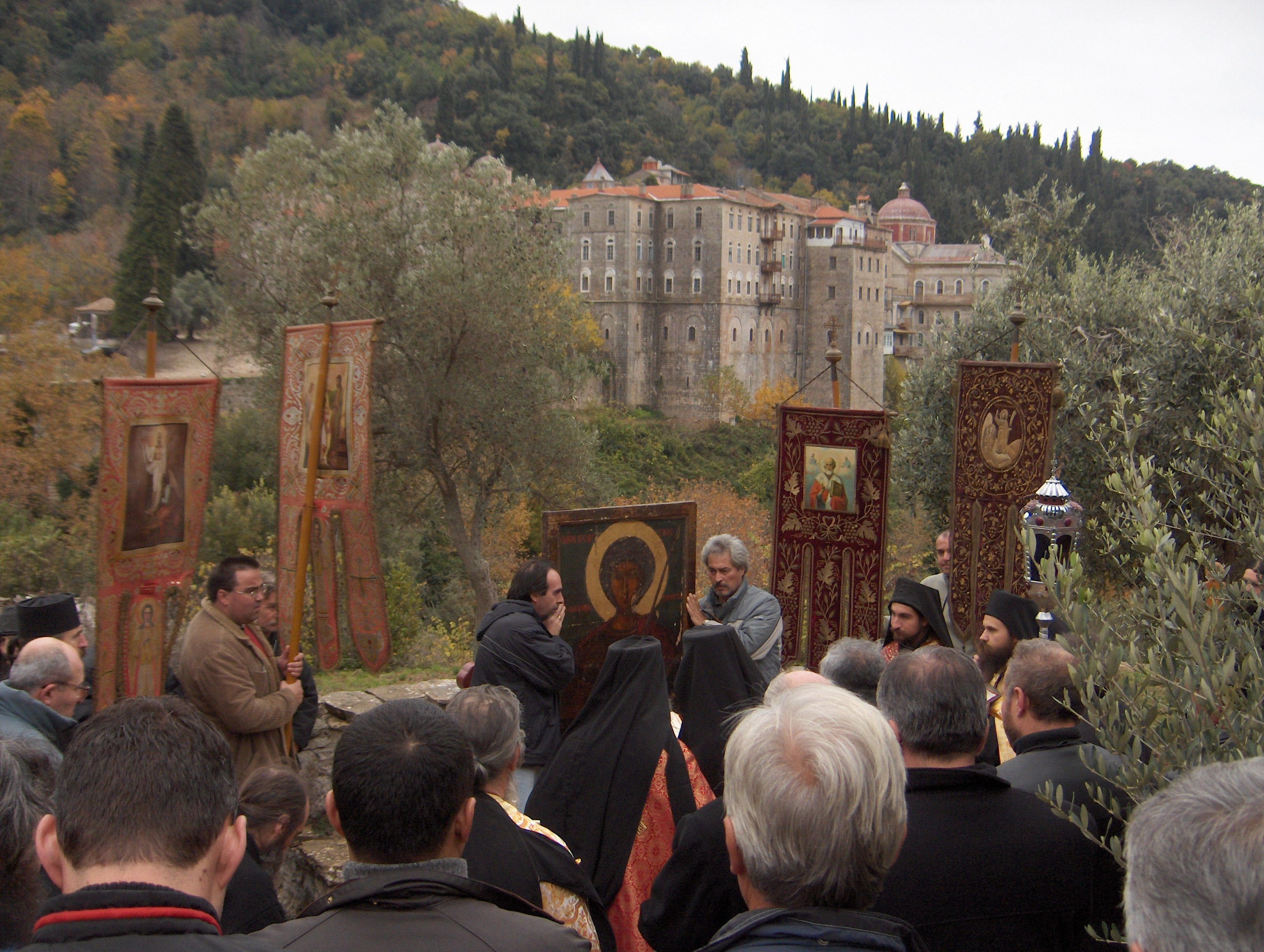 Литийно шествие с иконата на Св. Георги Зограф, Зографски манастир, Атон, Гърция © 2005 Georgi Dimitrov